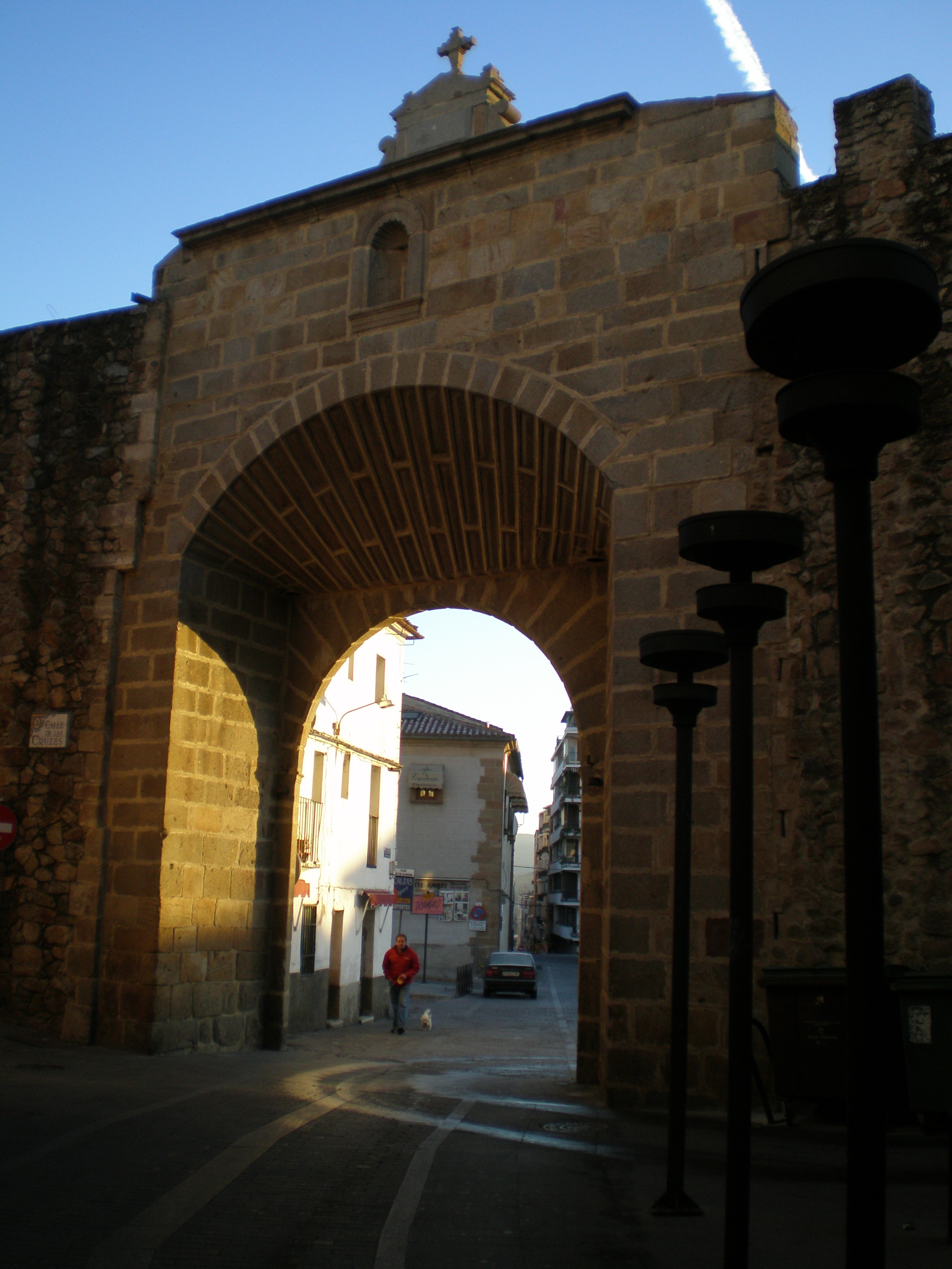 Puerta del Sol en Plasencia, desde la calle del Sol